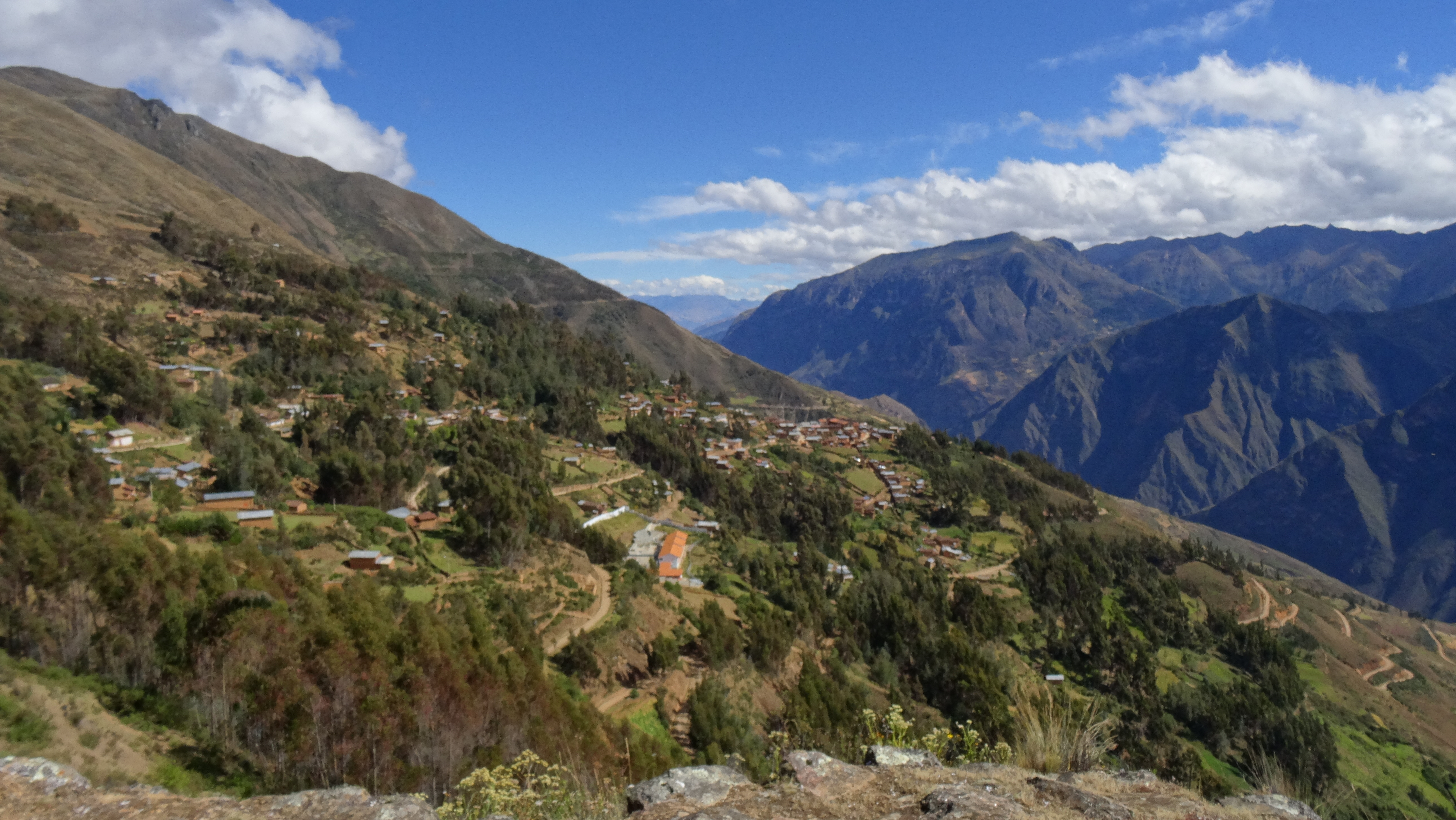 Vista del pueblo de Yanas desde las ruinas de Quillcay.